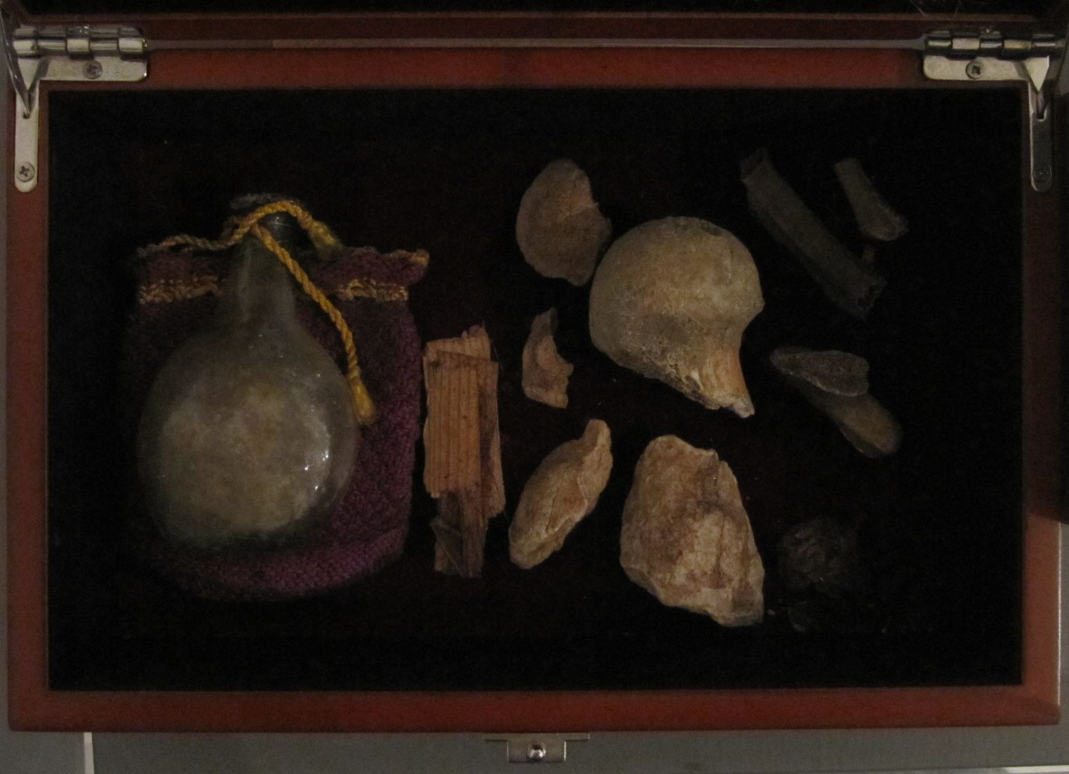 Weiheutensilien der Kirche St. Quirin in Aubing (heute München) von 1489. Aufgenommen in der historischen Ausstellung des "Fördervereins 1000 Jahre Aubing e.V." anlässlich der 1000-Jahr-Feierlichkeiten in Aubing, April 2010.